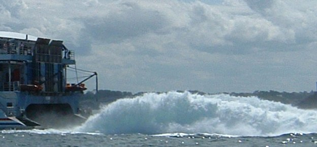 hydrojet